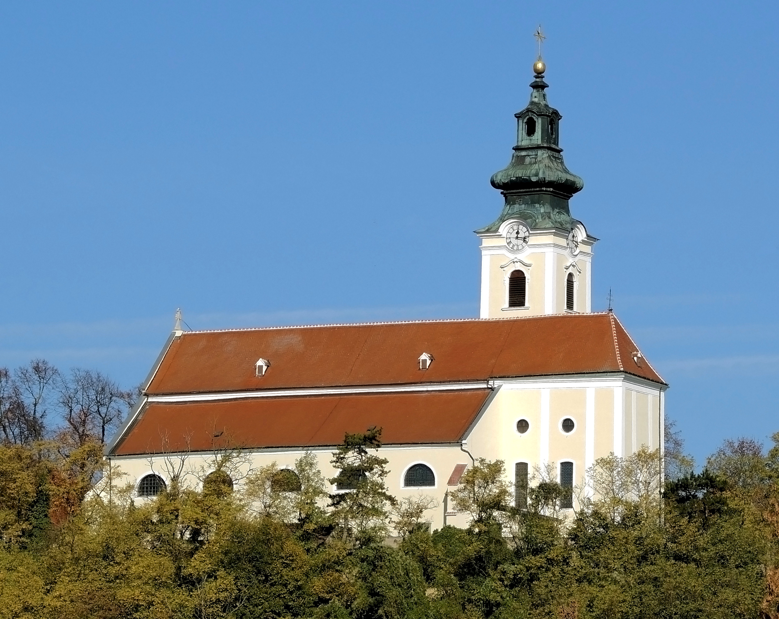 Kirchberg - Pfarrkirche hl. Stephan - Okt.2013